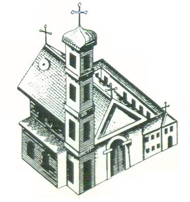 Беларуская (тарашкевіца): Бярэзань Горная (Biarezań Hornaja). Касьцёл і кляштар бэрнардынаў